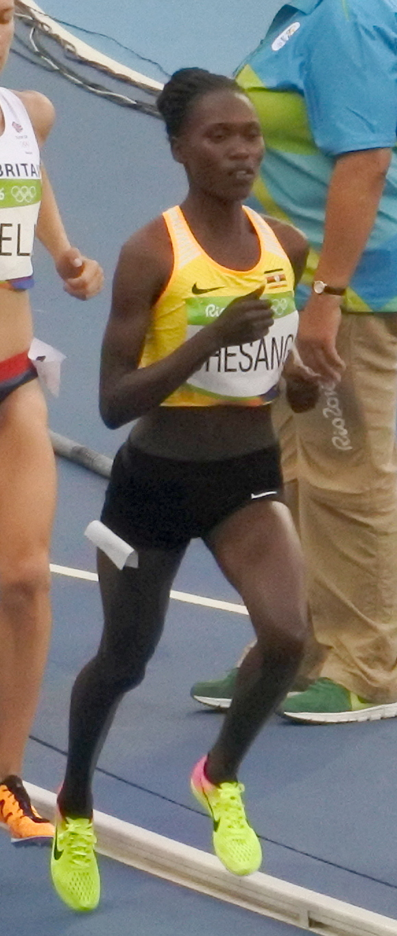 Rio 2016 - Eliminatórias 5000m Feminino